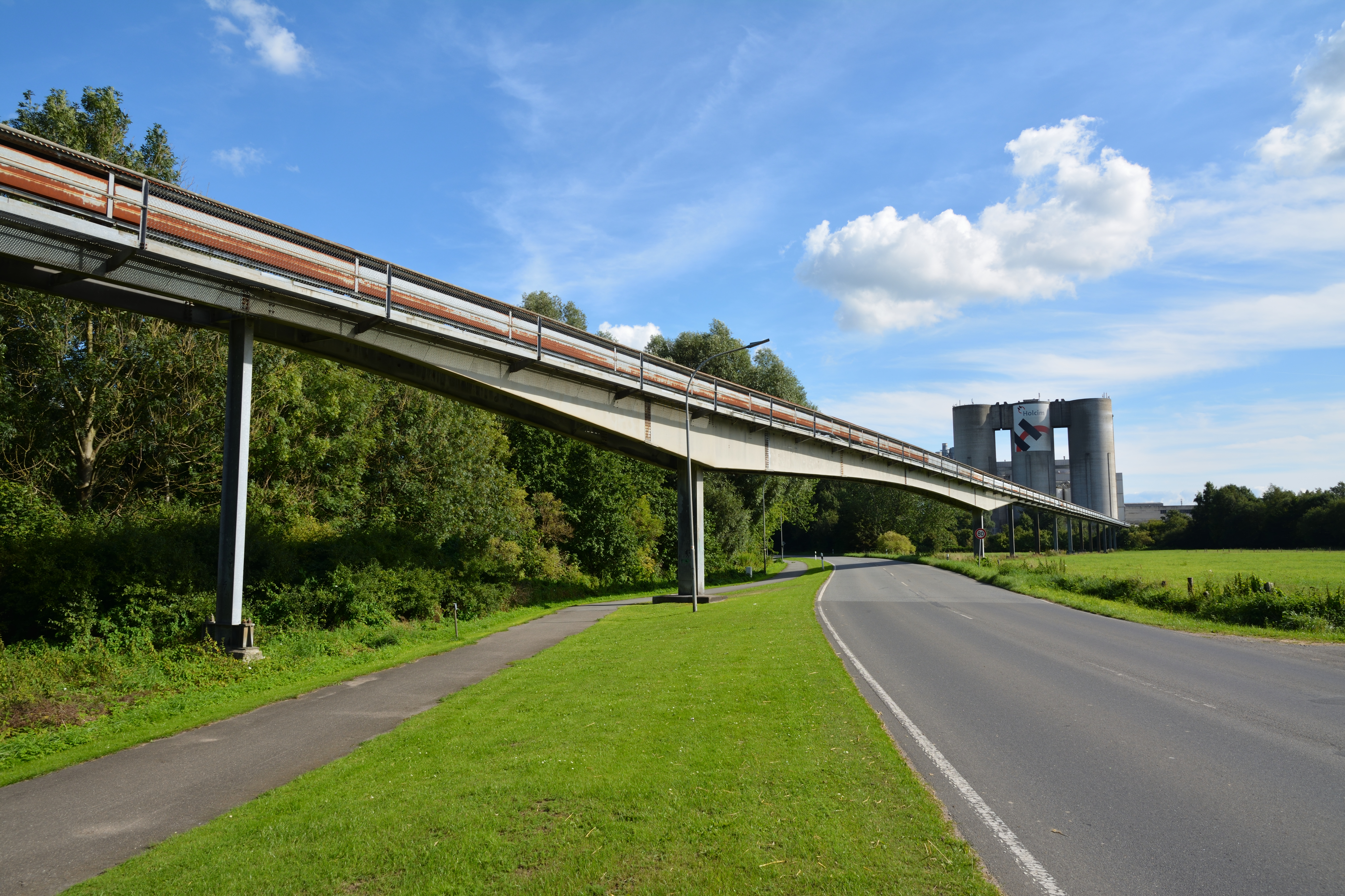 Das stillgelegte Föderband von der Kreidegrube Saturn zur Zementfabrik in Lägerdorf